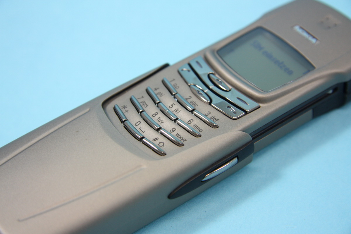 nokia 8910 titanium